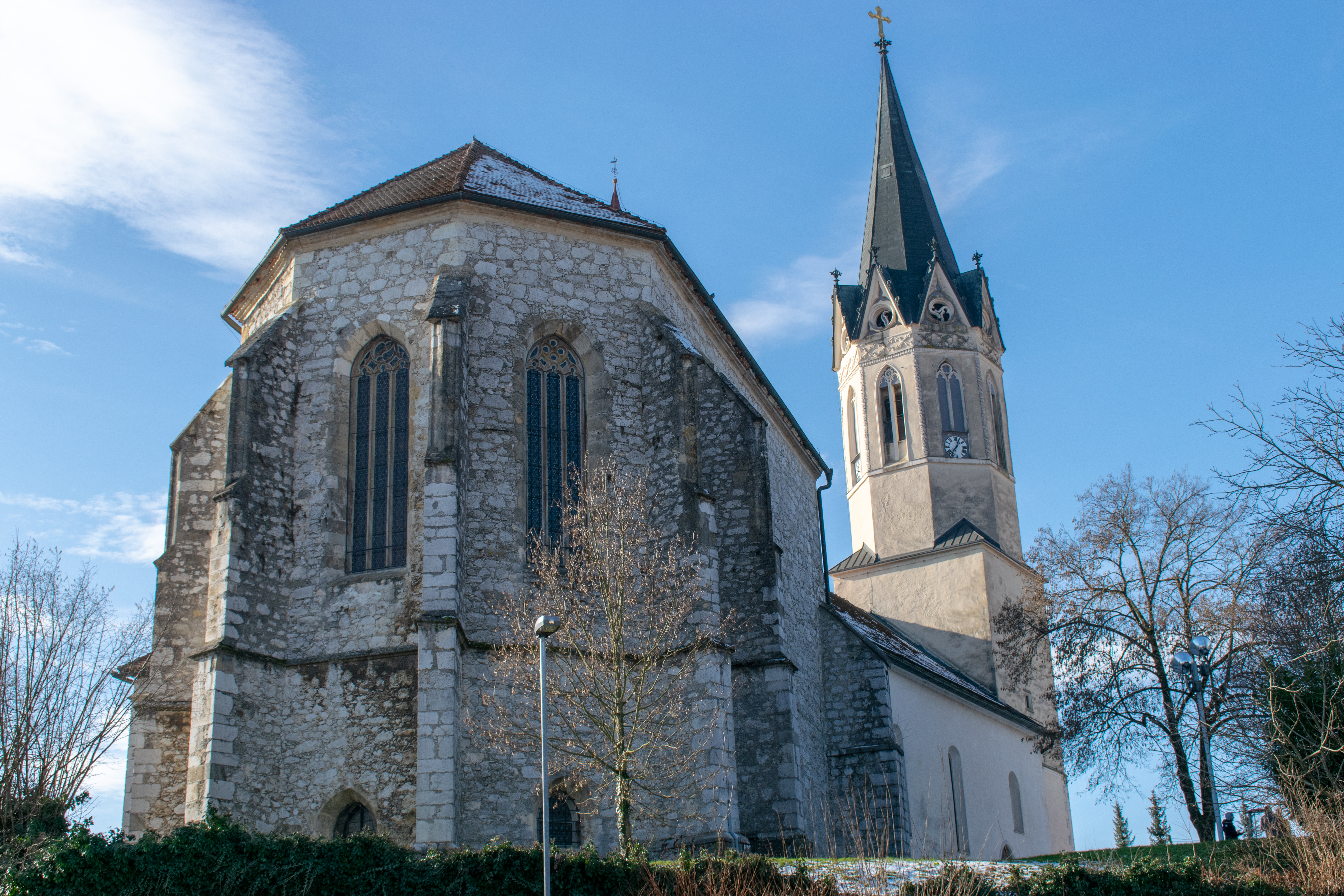 Novo mesto